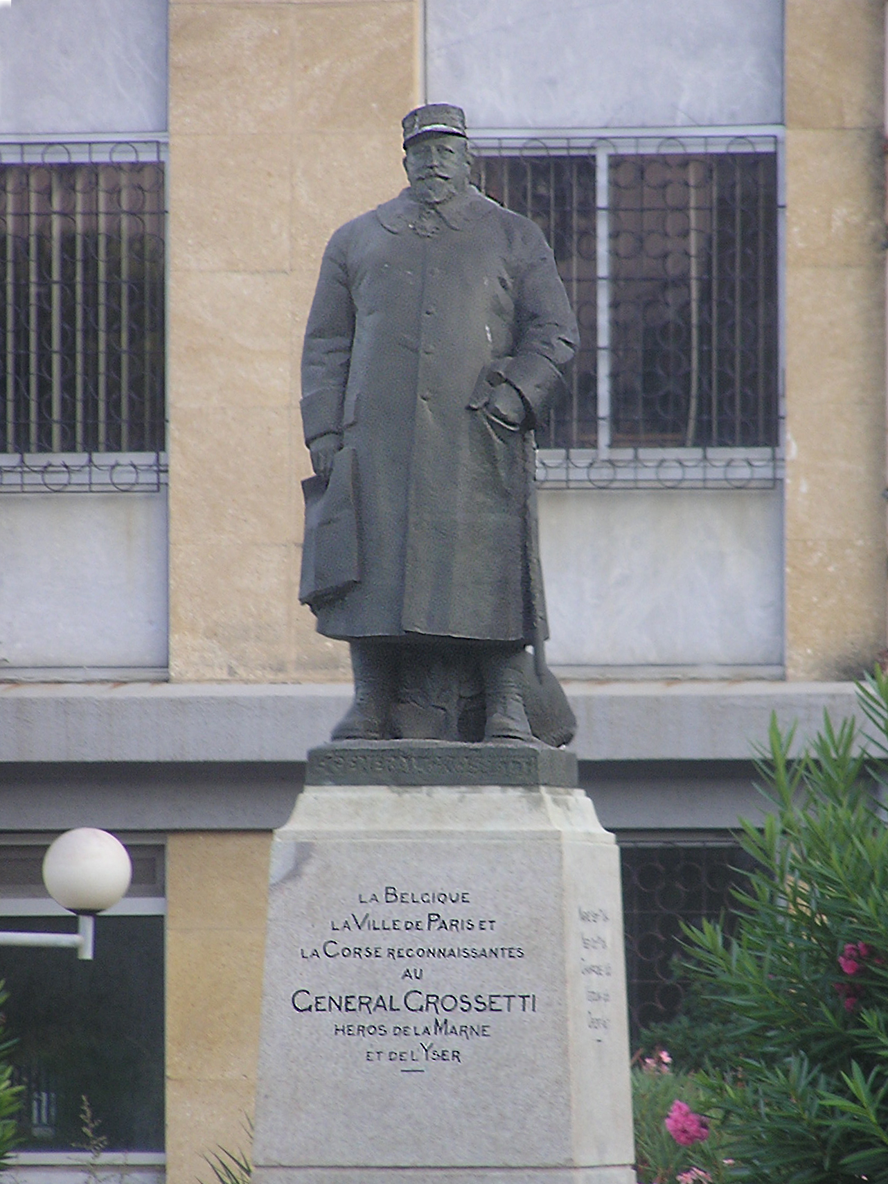 in Ajaccio